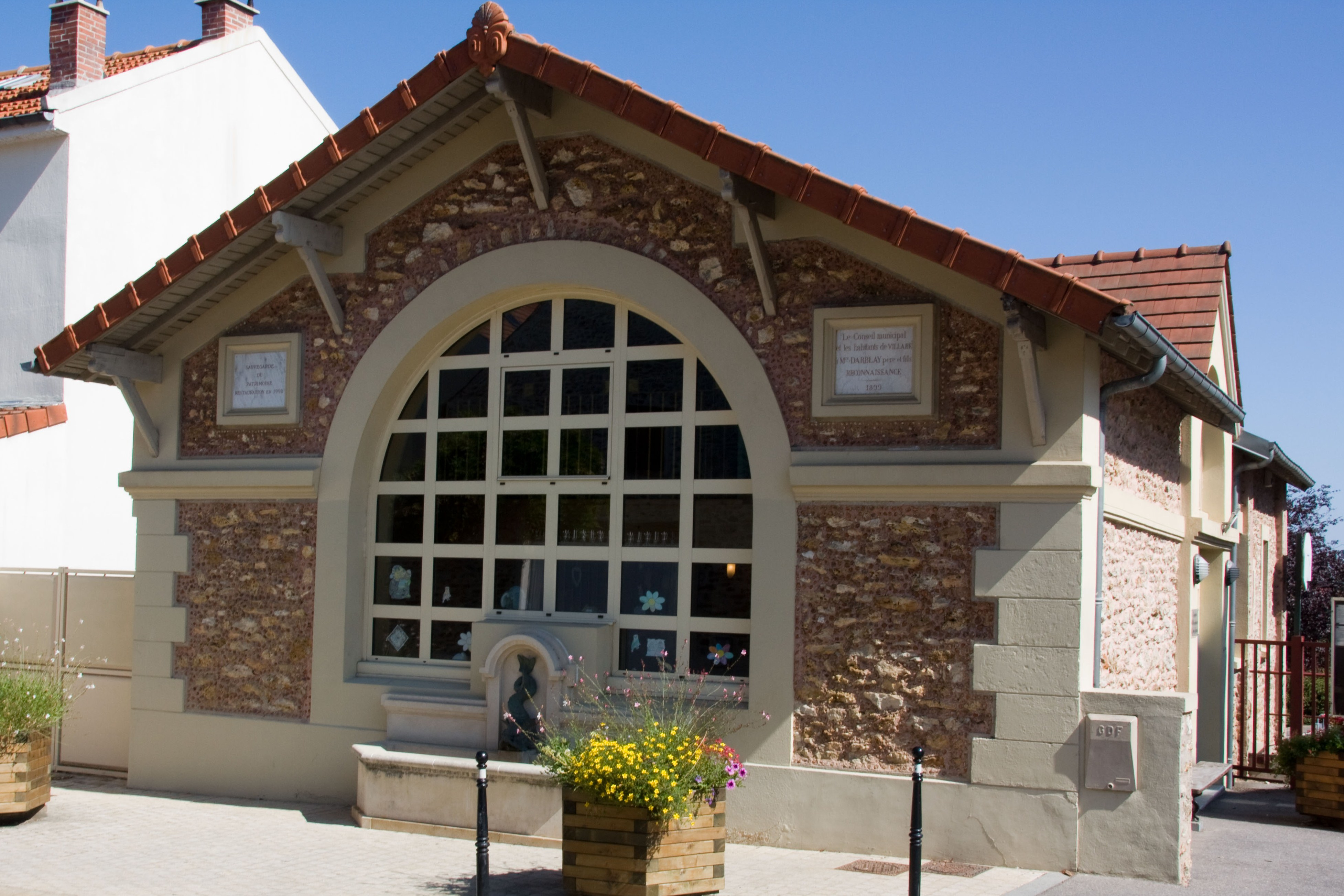 Ancien lavoir-abreuvoir reconverti en halte-garderie, Villabé, Essonne, France